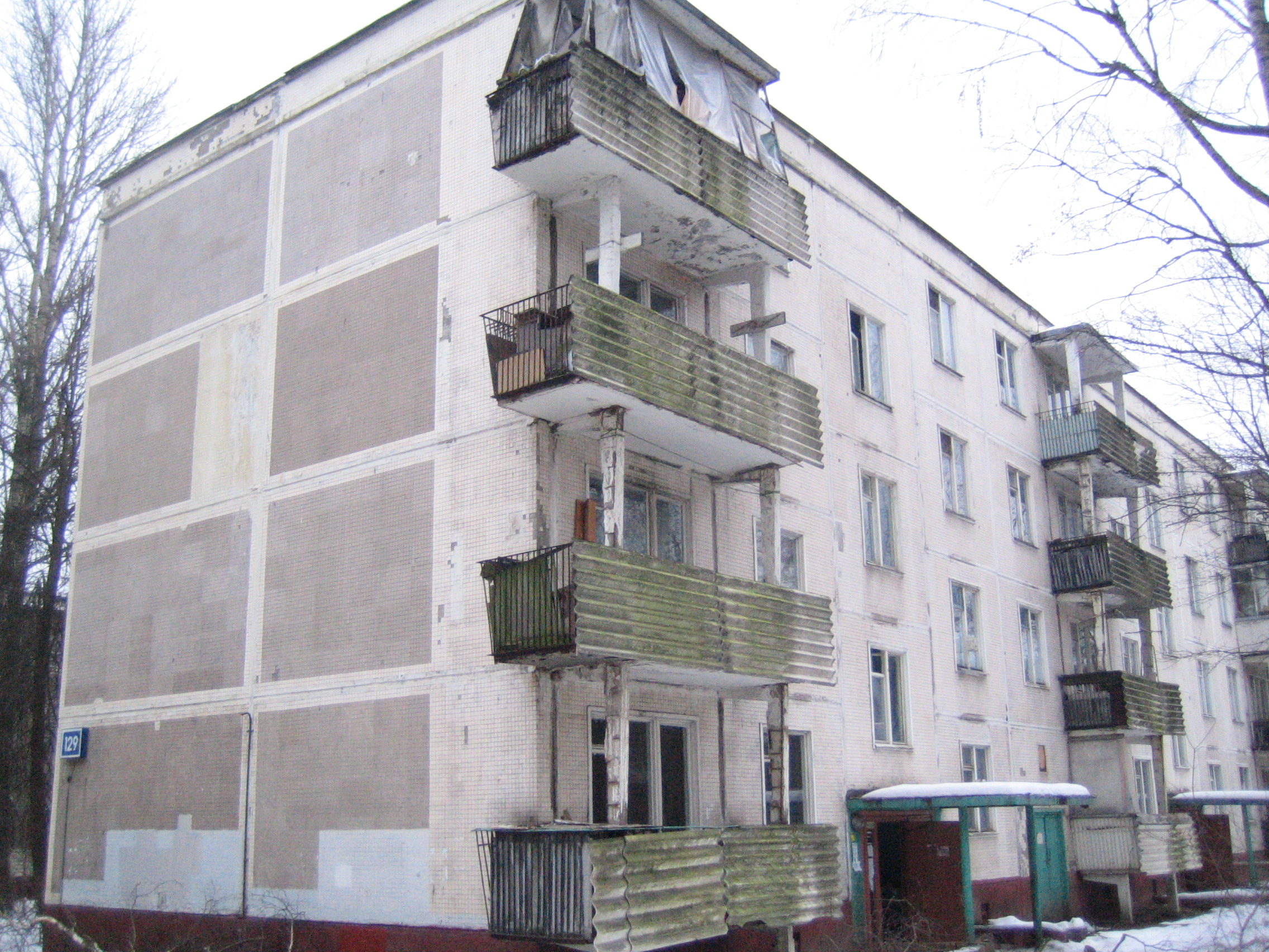 Панельная хрущевка модификации К-7-3-3.На торце виден номер 126.Эта хрущевка-126 корпус Зеленограда